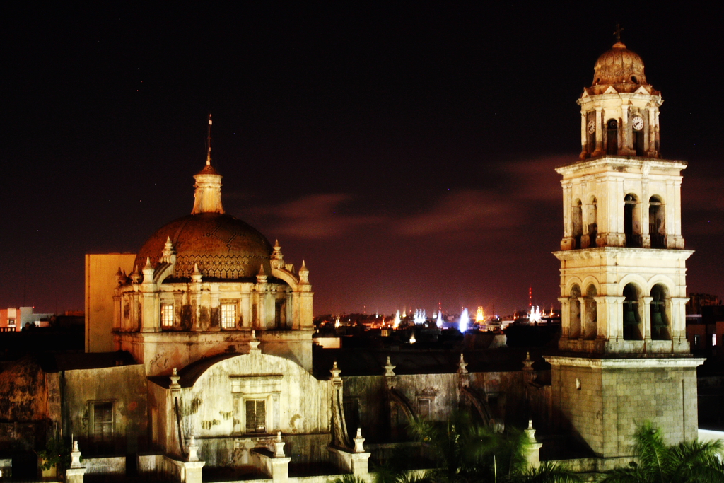 Puerto de Veracruz, México. Foto tomada desde el mirador del Hotel Colonial.